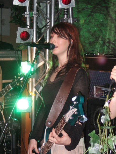 Heini, Bassistin der Band Indica